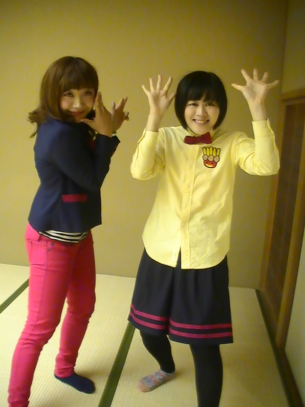 ジョリー惑星 (2016年9月)